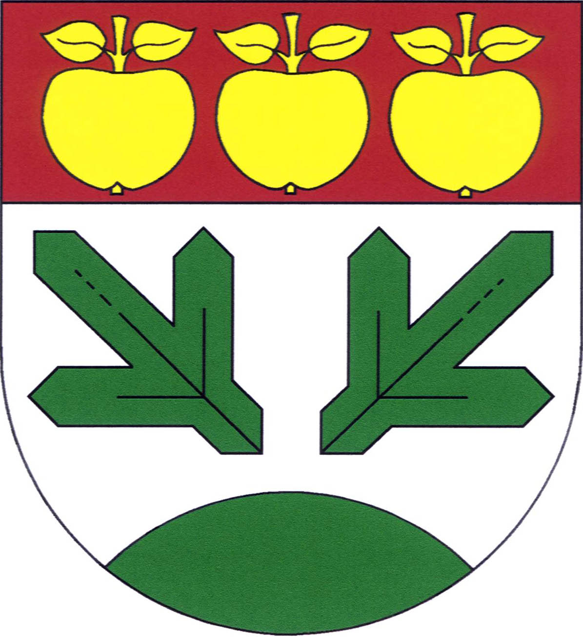 Znak obce Boleboř